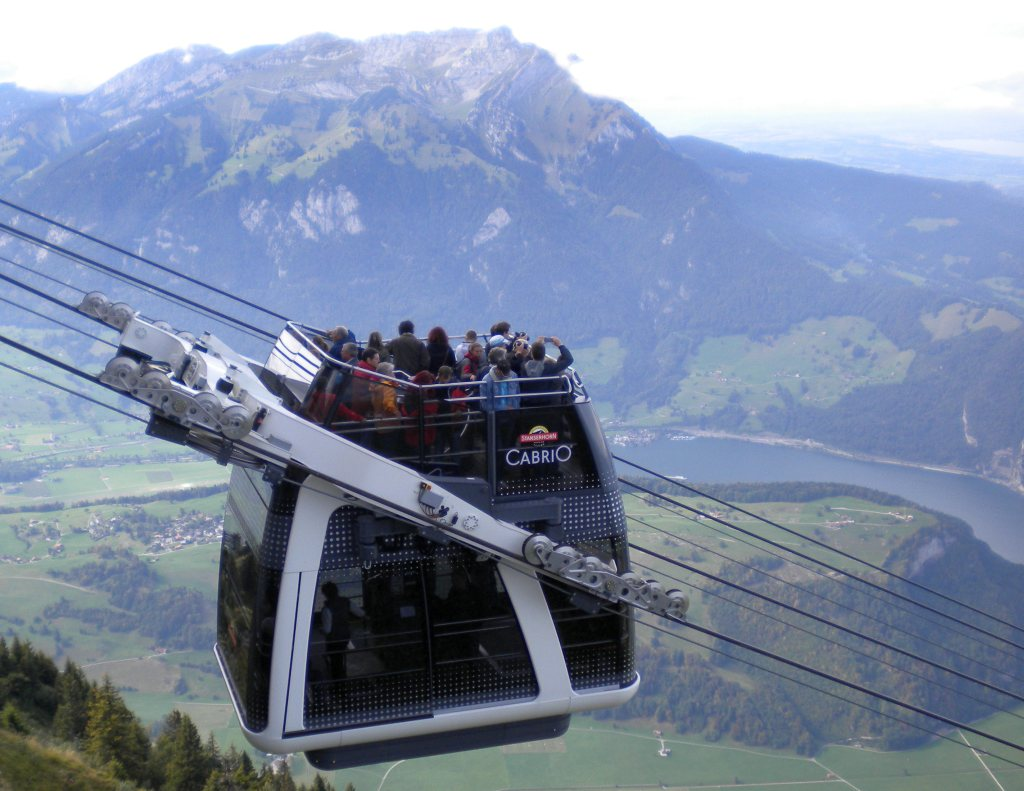 Cabriobahn der Stanserhorn-Bahn in Stans, Kanton Nidwalden, Schweiz